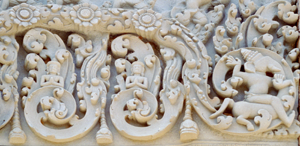 Finesse d'une frise du Ta Prom. Ganesha et sa suite.